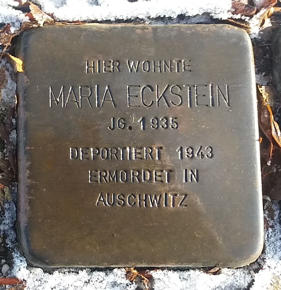 Stolperstein für Maria Eckstein, Mitglied der Großfamilie Eckstein, Vöhringen (Iller)